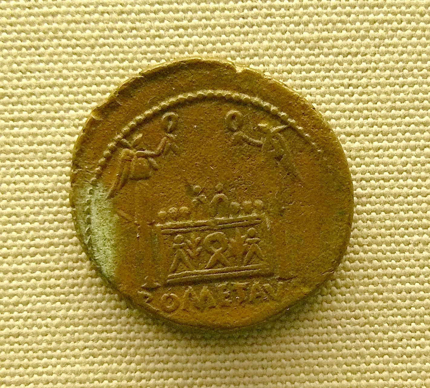 Dupondius de bronze, Auguste (frappé vers +10 à +14) atelier de Lyon, revers l'autel des trois Gaules légende ROM ET AUG - Musée d"archéologie nationale de Saint-Germain-en-Laye, Inv n° 2396 N